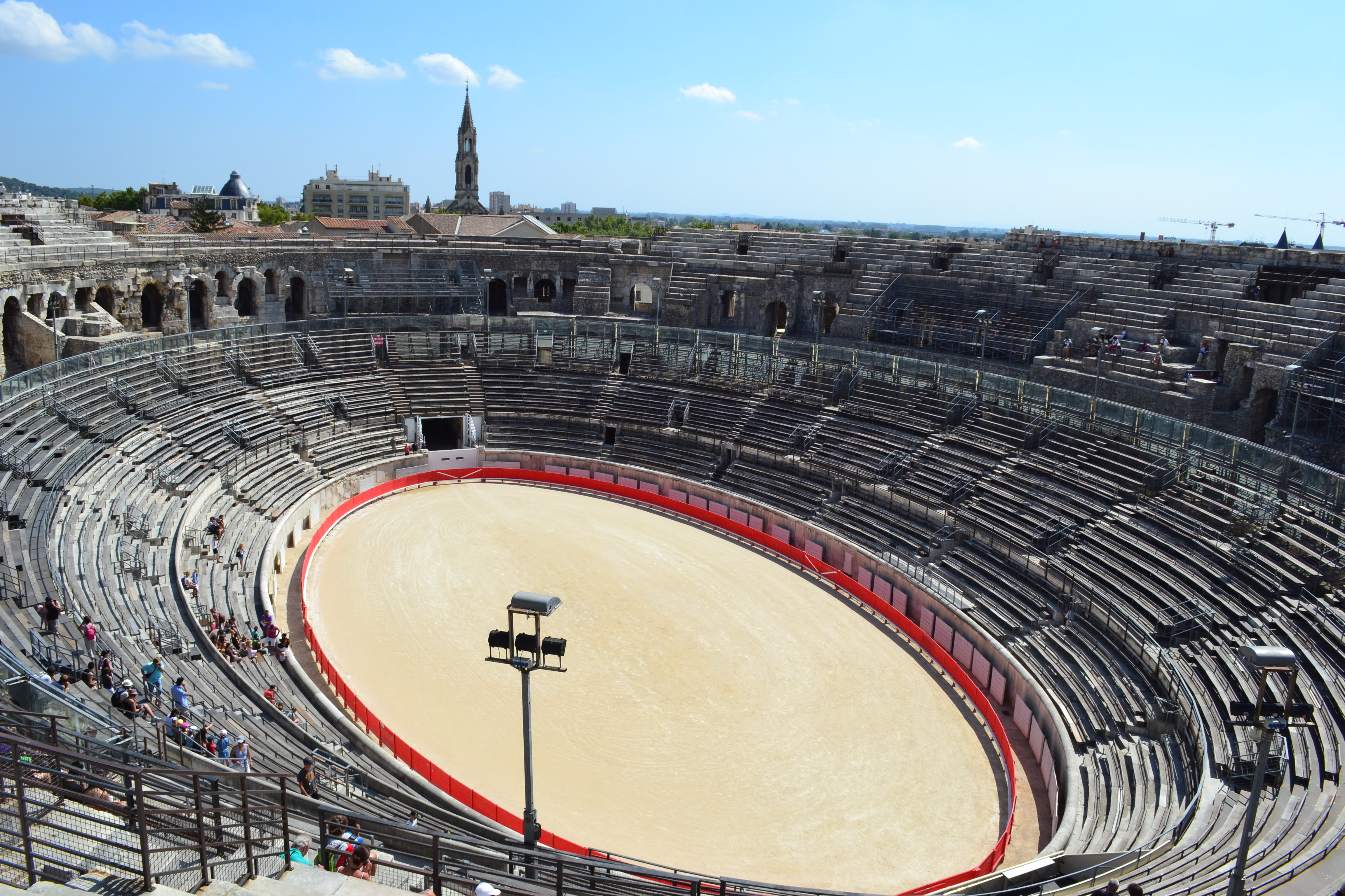 Arènes de Nimes